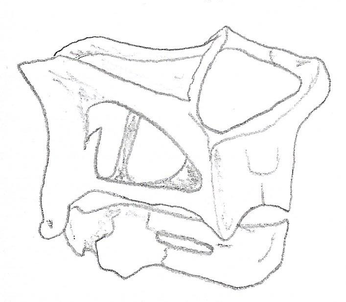 Skull of Geikia